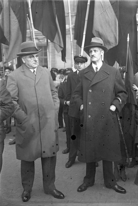 Der grosse Aufmarsch der Republikaner zur Preussenwahl im Lustgarten in Berlin ! Der preussische Ministerpräsident Dr. Braun (links) und der sozialdemokratische Reichstagsabgeordnete Dr. Breitscheid (rechts) hielten ihre grossen Ansprachen zur Preussenwahl.